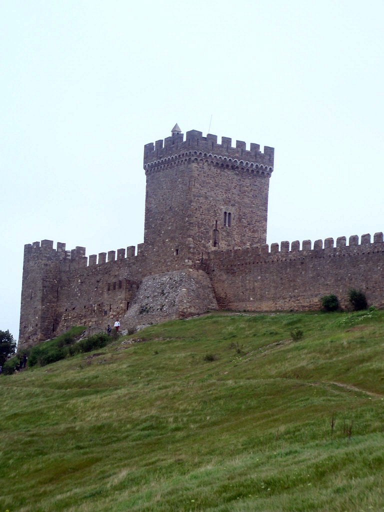 Fortaleza de Sudak (Crimea)